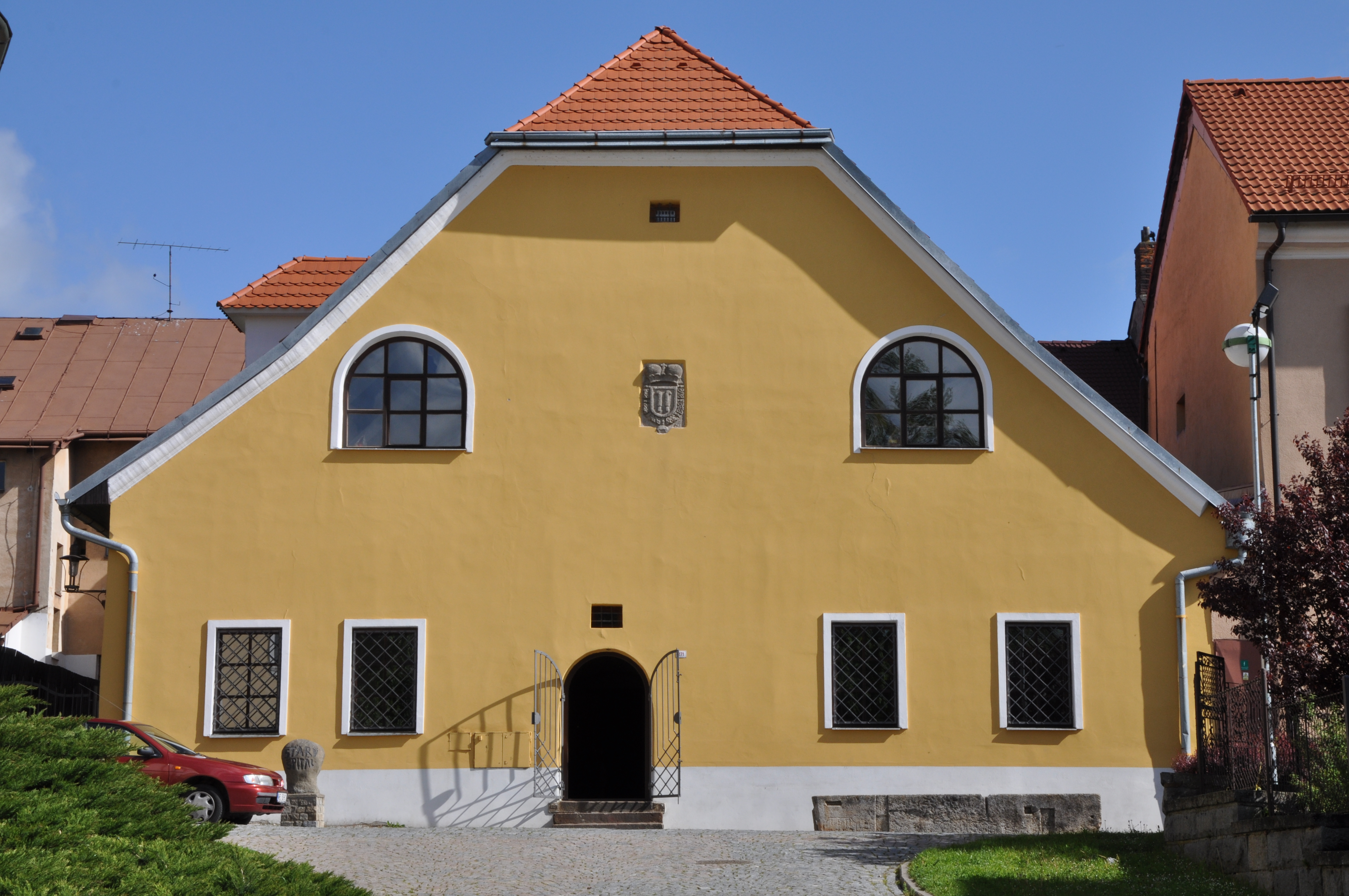 Starý špitál. Starý špitál v Přibyslavi nechal v roce 1692 vystavět kníže Ferdinand z Ditrichštejna. Vyšehrad dům č. p. 271.Město Přibyslav. Okr. Havlíčkův Brod. Kraj Vysočina Czech Republik.